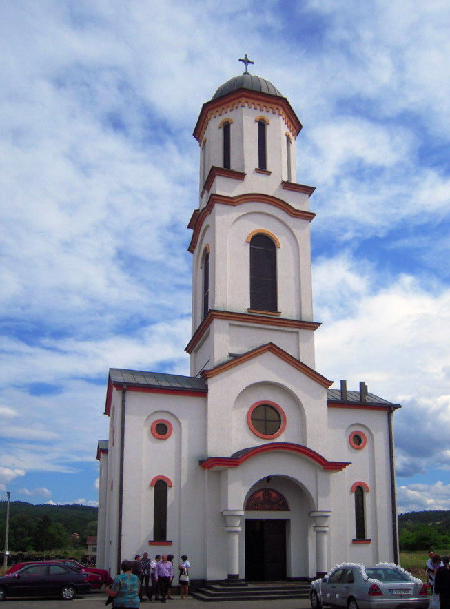 Храм_Покрова_превете_Богородице_у_Трну